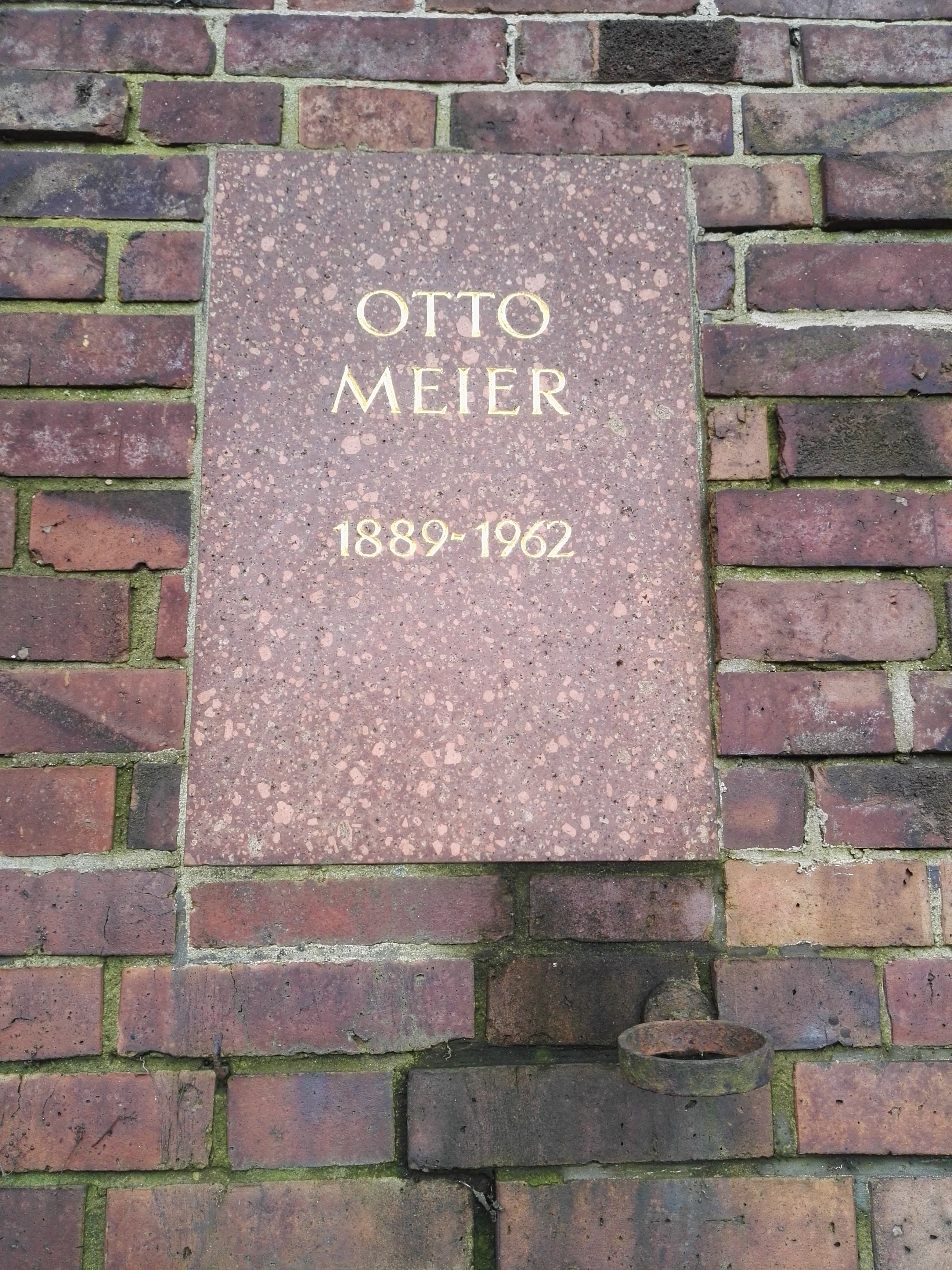 Grab von Otto Meier in der Gedenkstätte der Sozialisten auf dem Zentralfriedhof Friedrichsfelde in Berlin-Lichtenberg